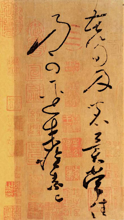 这件"苦笋帖"是唐代草书大家怀素的传世亲笔墨迹之一．文字不多，总共才14字，不仅能使我们观赏到那娴熟的笔法和行云施雨、走蛇舞龙般的线条之美，同时还能直接感受到作者书写时的内在气质。